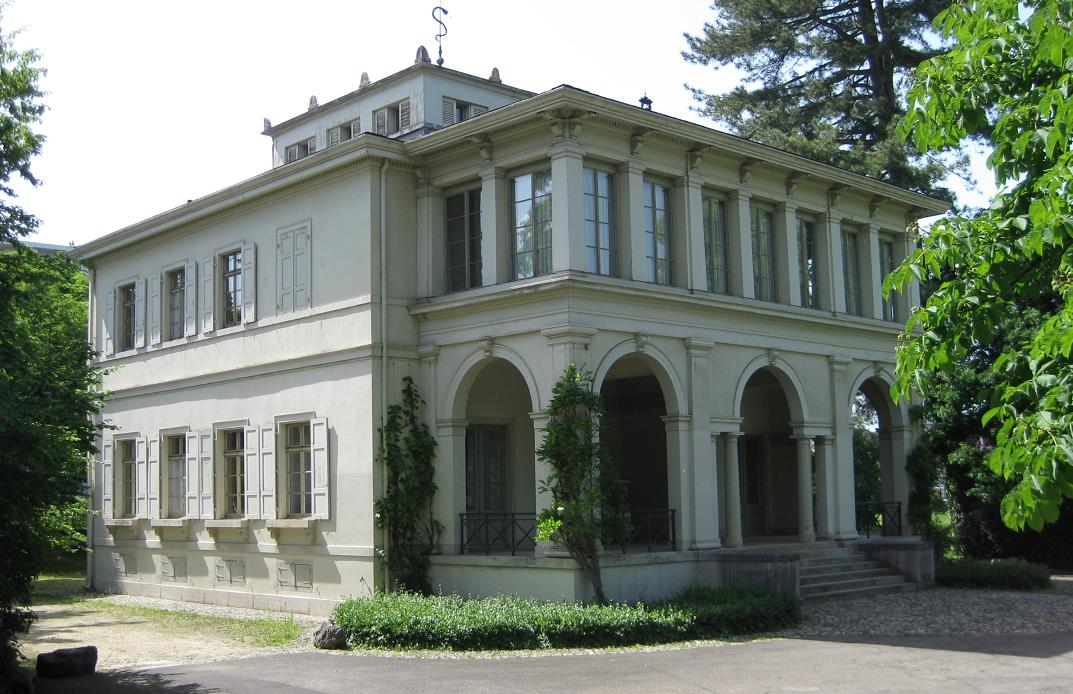 Villa Ehinger, Münchenstein. North and West sides